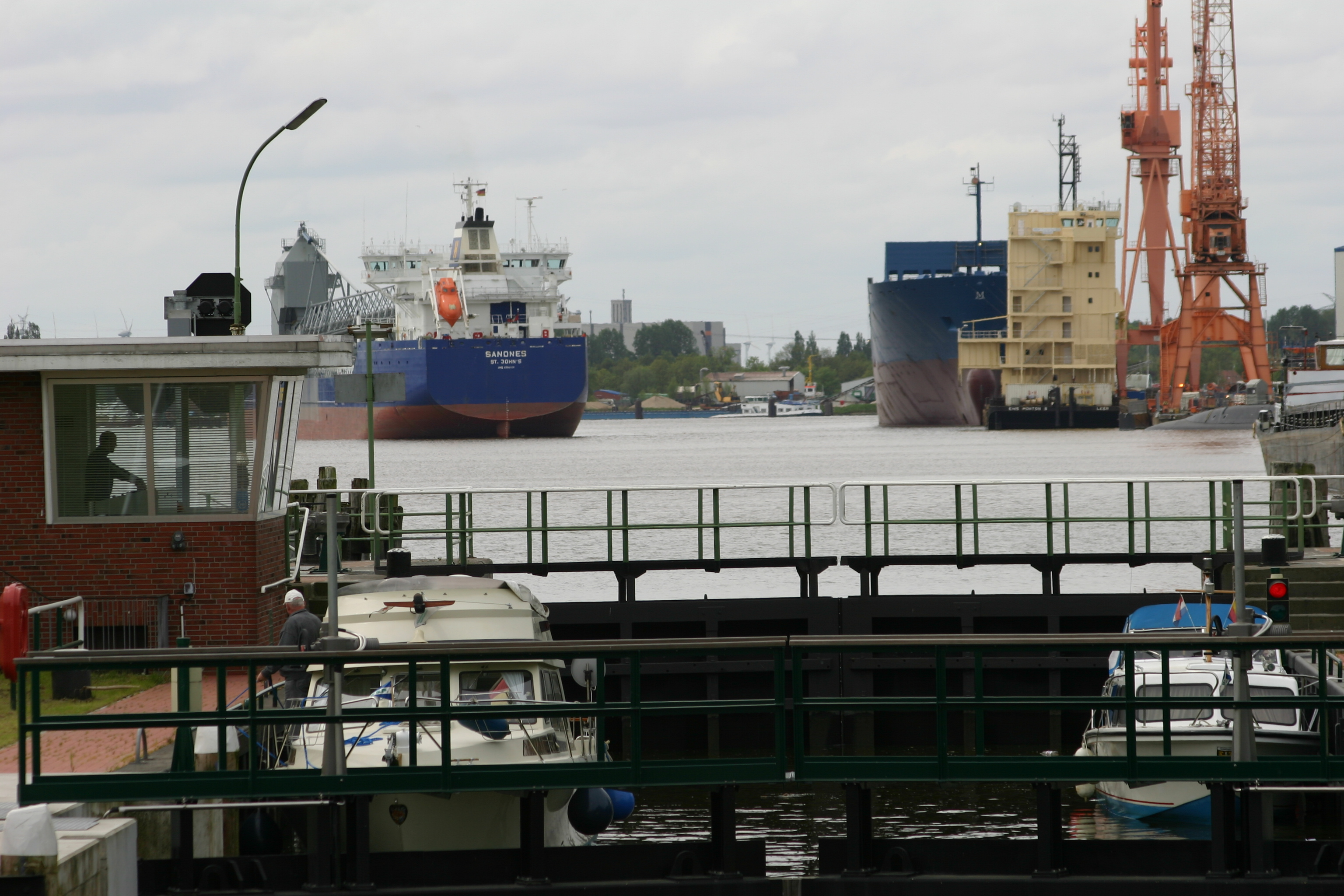 Borssumer Schleuse und Blick in den hafen von Emden, Ostfriesland, Niedersachsen